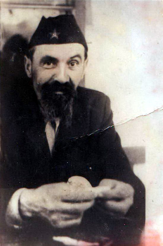 Srpski (latinica): Stojan Cerović (1888. Tušina, Drobnjaci - 1943). Fotografija iz 1943. godine. Jedan je od najistaknutijih intelektualaca između dva rata, beogradski i francuski student, urednik više časopisa, književnik, borac i vijećnik AVNOJ-a. Od 1920. godine, bio profesor u nikšićkoj Gimnaziji, koja danas nosi njegovo ime. Izvor: porodični foto album.